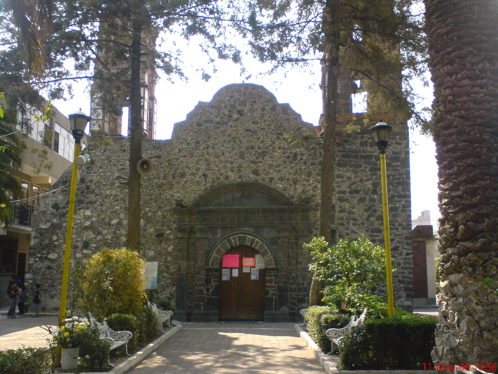 Parroquia de San Sebastián Mártir (templo que data del siglo XVI), en San Sebastián Chimalpa, Los Reyes La paz, Estado de México